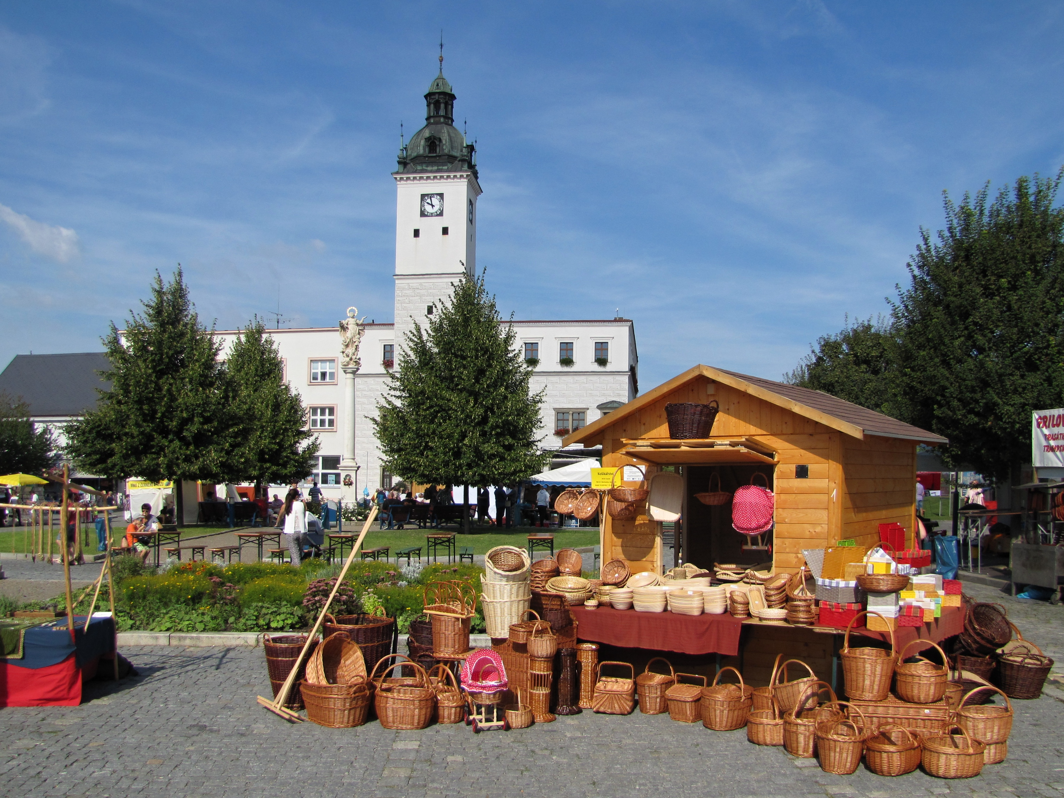 Radnice v Kyjově na Masarykově náměstí během folklorních slavností Slovácký rok v srpnu 2016